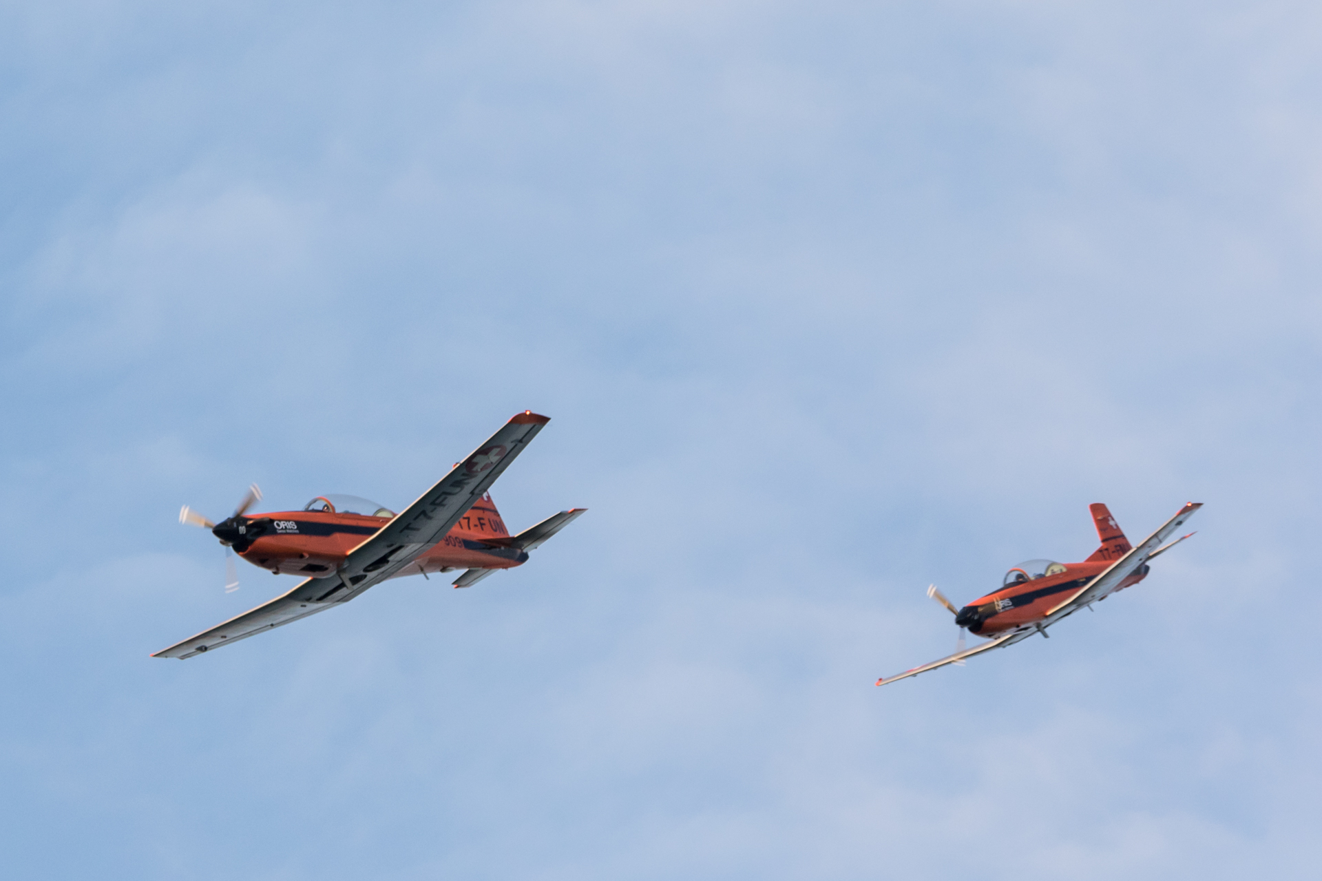 Pilatus PC-7 Turbo Trainer über dem Bodensee